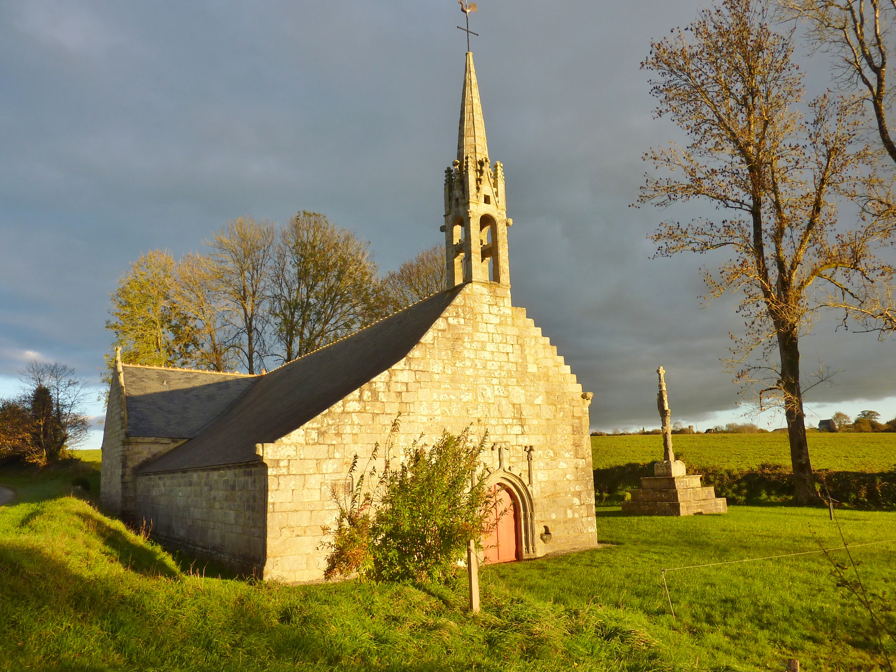 Trégourez : chapelle Notre-Dame de Ponthouar (XVe et XVIe siècles)